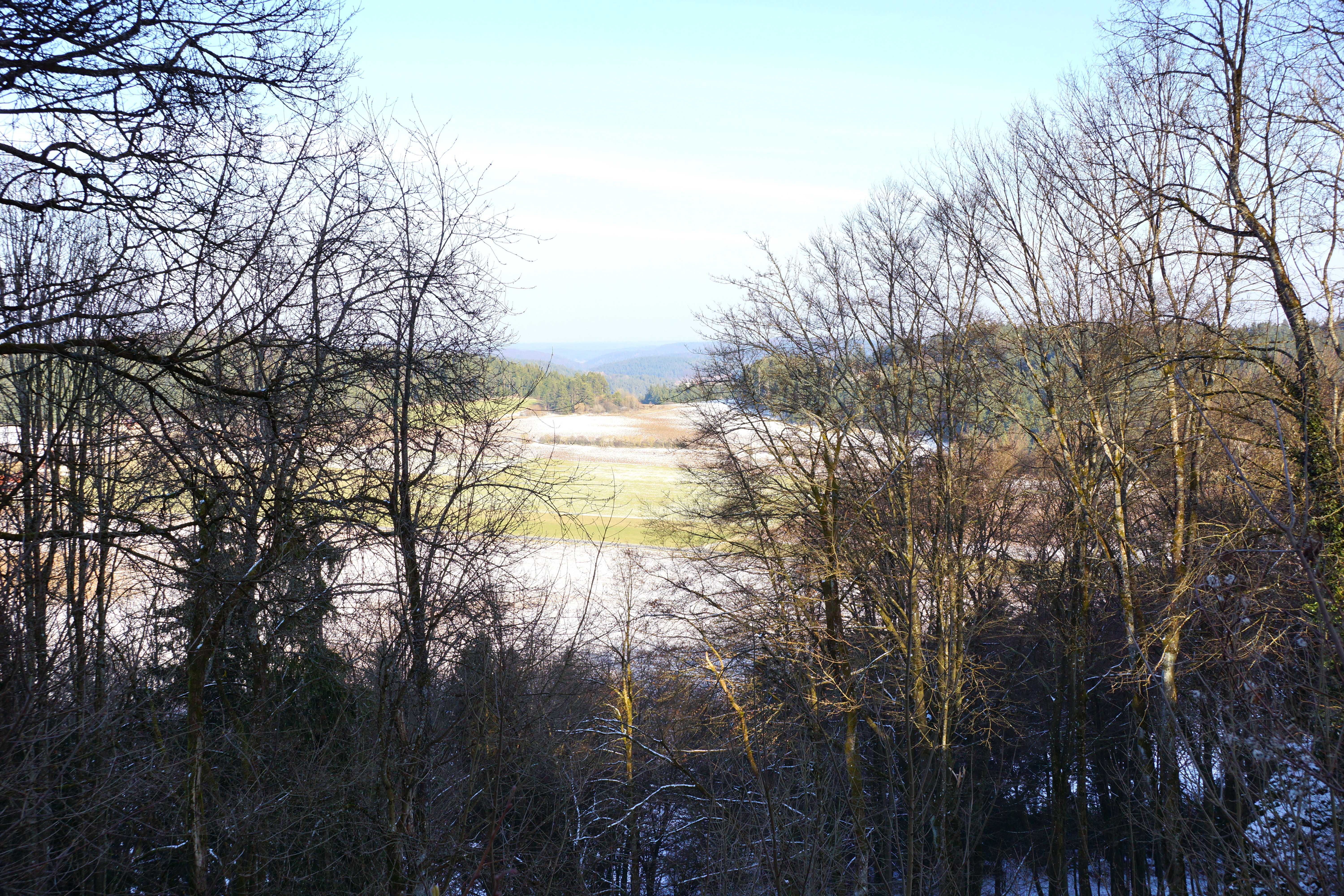 Der Habsberg östlich von Neumarkt